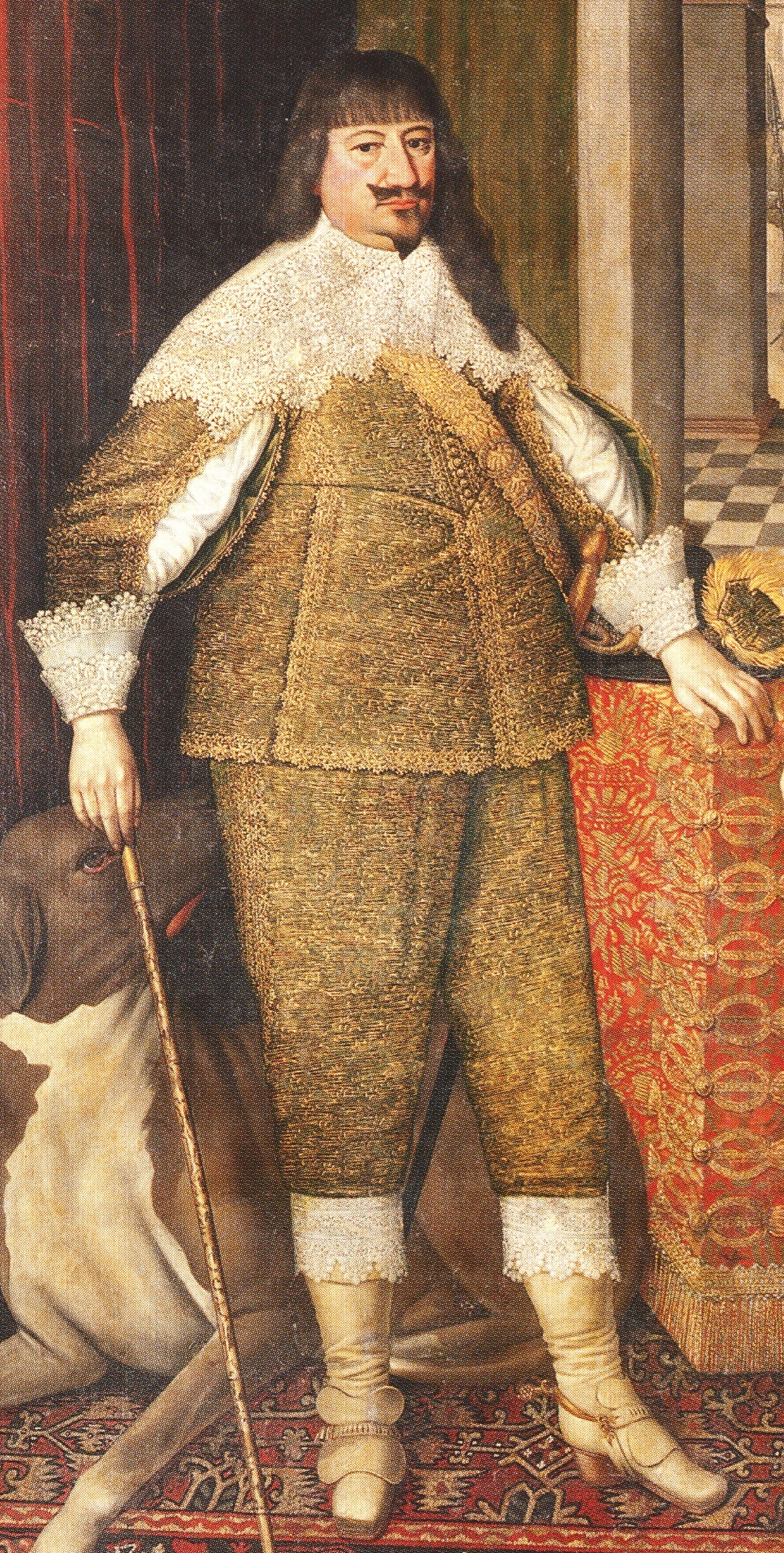 Ausschnitt aus dem Doppelbildnis mit seiner Gemahlin Elisabeth Charlotte